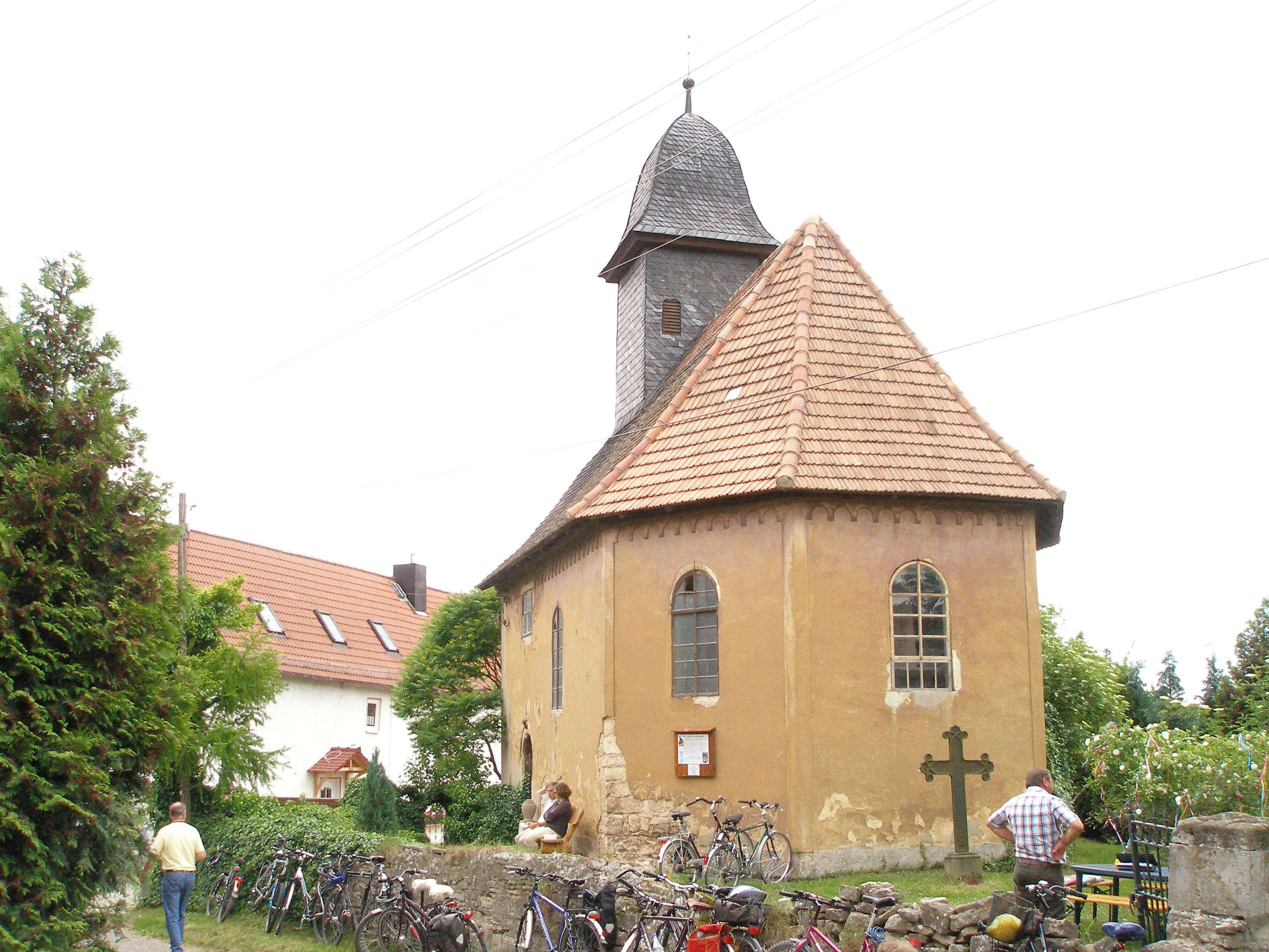 Kirche Kleinlöbichau am Tag der Eröffnung des Kirchenradweges